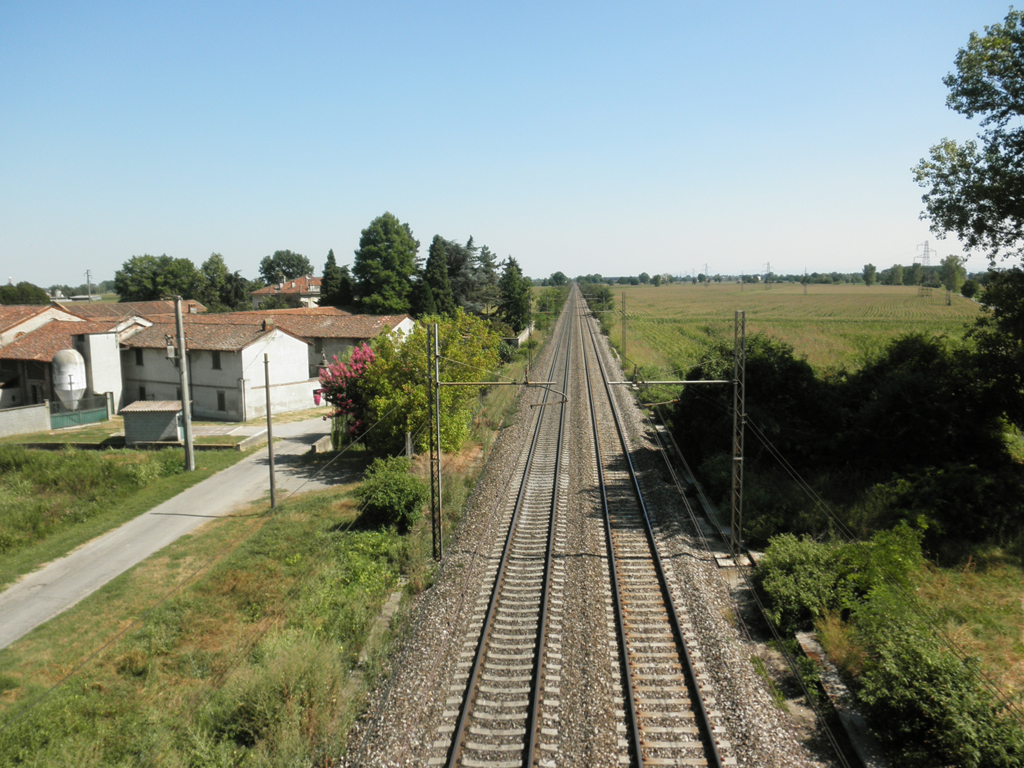 La ferrovia Milano-Bologna nel territorio comunale di Mairago (località Cascina Codazza).